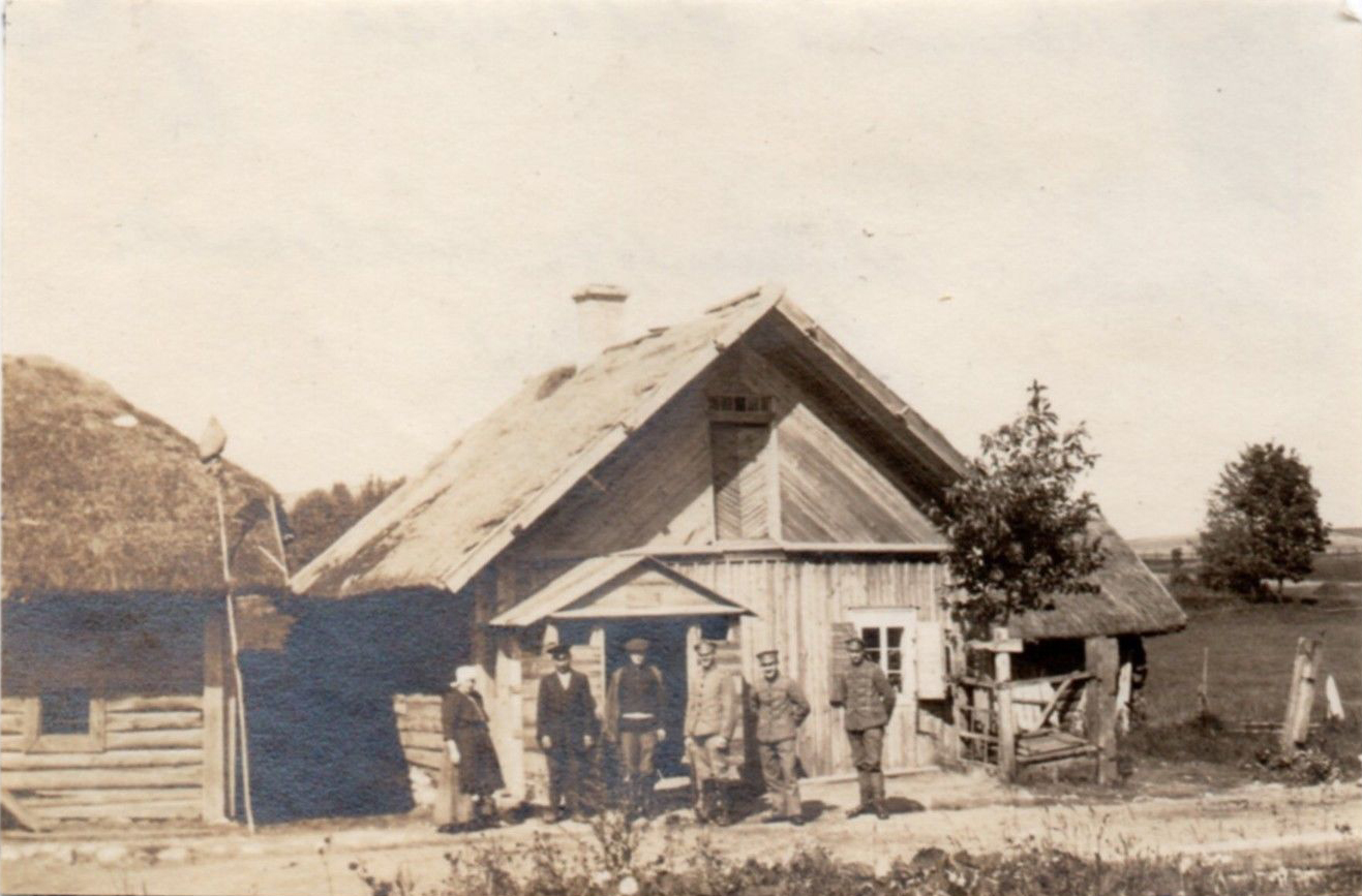 Беларуская (тарашкевіца): Жукойні Жалядзкія (Žukojni Žaladzkija). Касьцёл